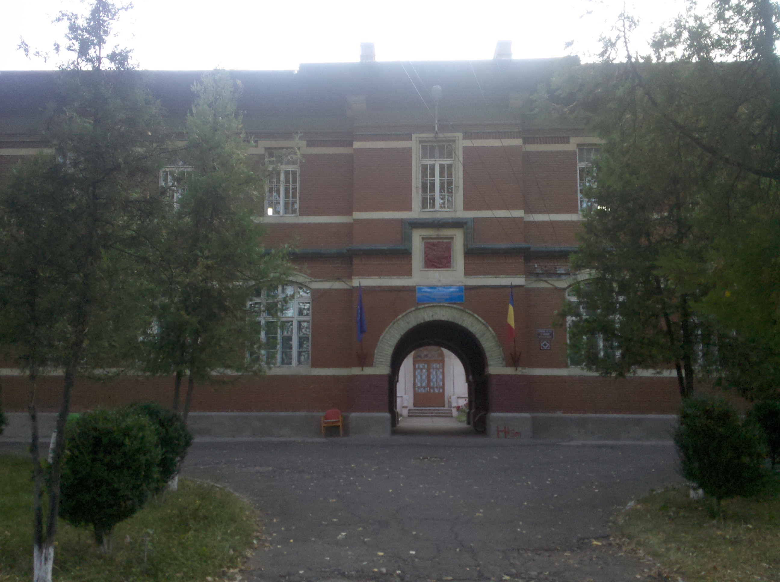 Seminarul Ortodox Sfântul Gheorghe din Roman